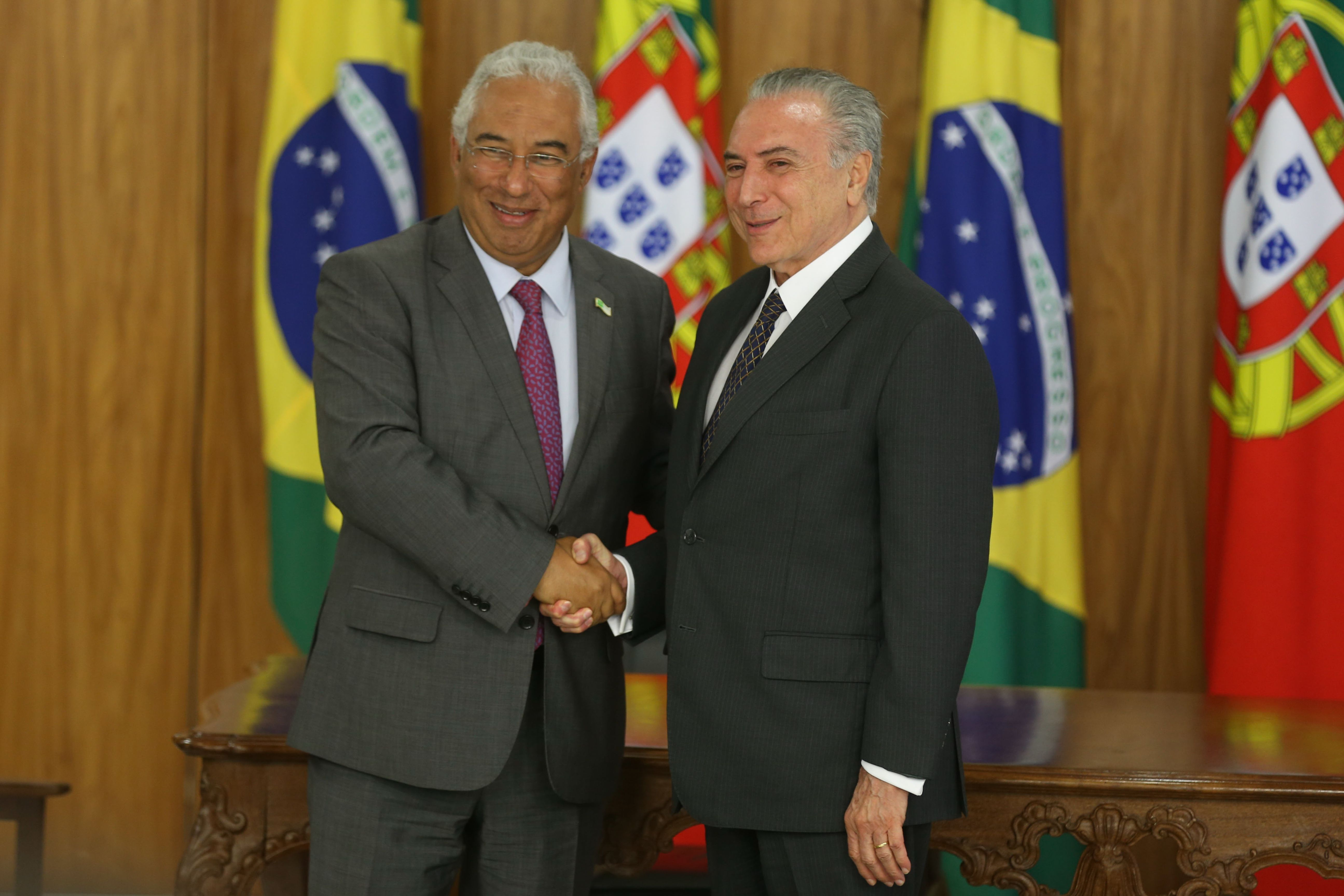 Michel Temer recebe premiê de Portugal, António Costa